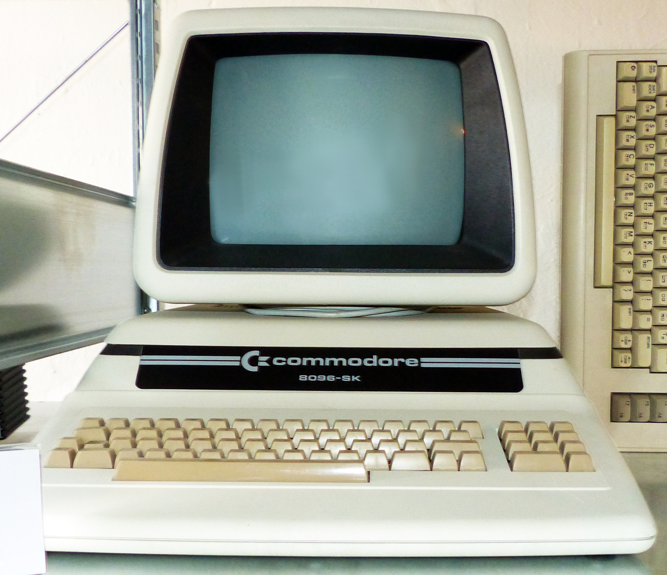 Commodore CBM 8096 SK, West Chester 1980-1985; Exponat in den Technischen Sammlungen Dresden